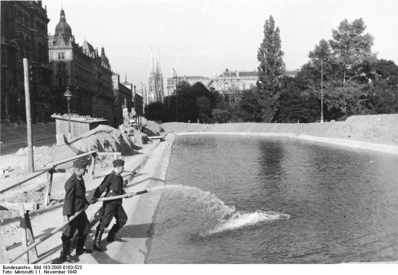 Wien ist bereit Vor dem Wiener Rathaus ist ebenfalls ein grosses Bassin, das stehts voll Wasser gehalten wird. Prop.Kp: LwKBEK , Film-Nr. 5817/32a Bildberichter: Morocutti Text: Franz Wien , 1.11.1943